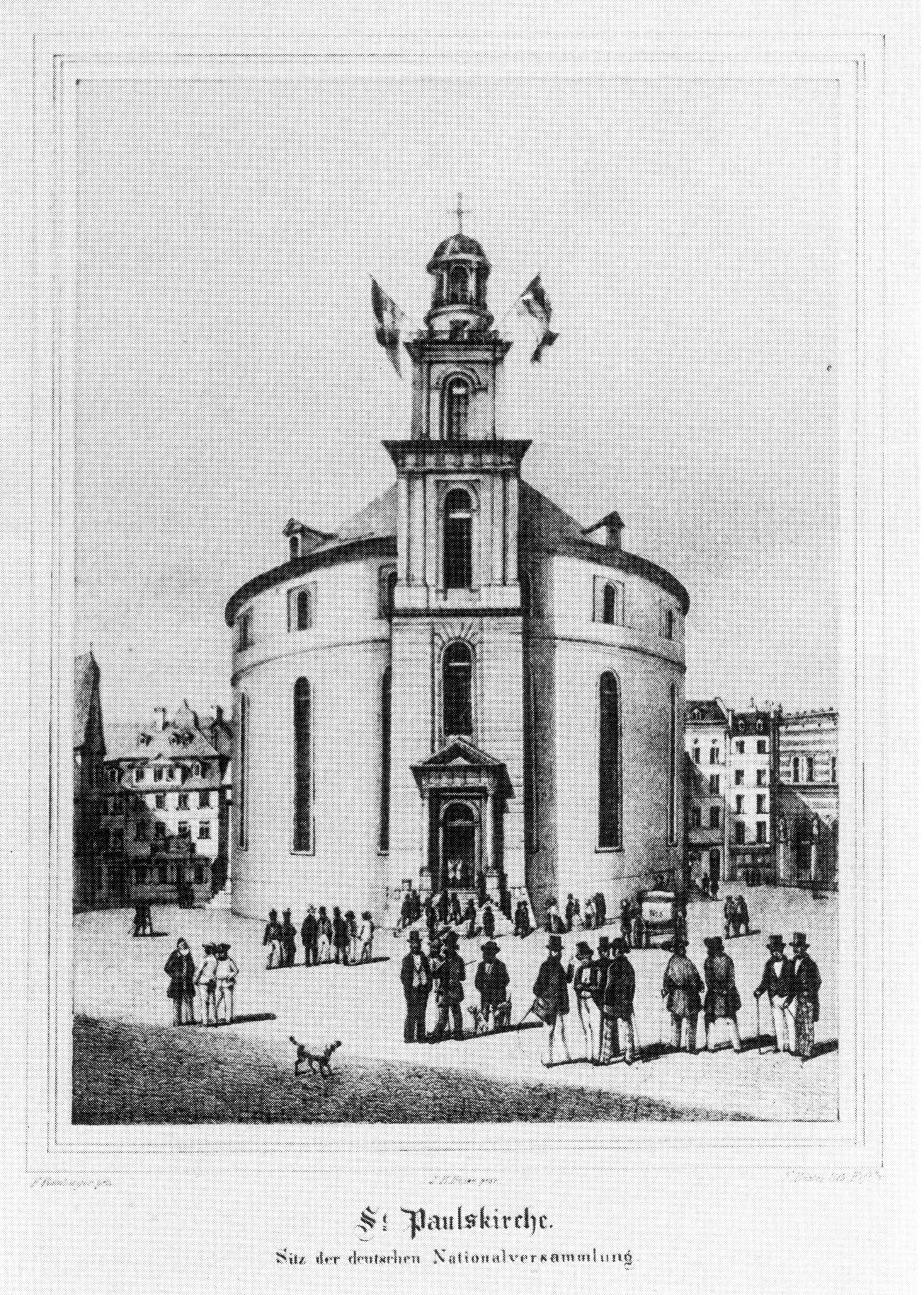 Lithographie von Franz Heister. “St. Paulskirche, Sitz der deutschen Nationalversammlung”.